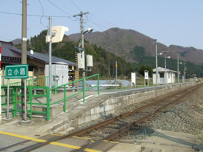 JR立小路駅